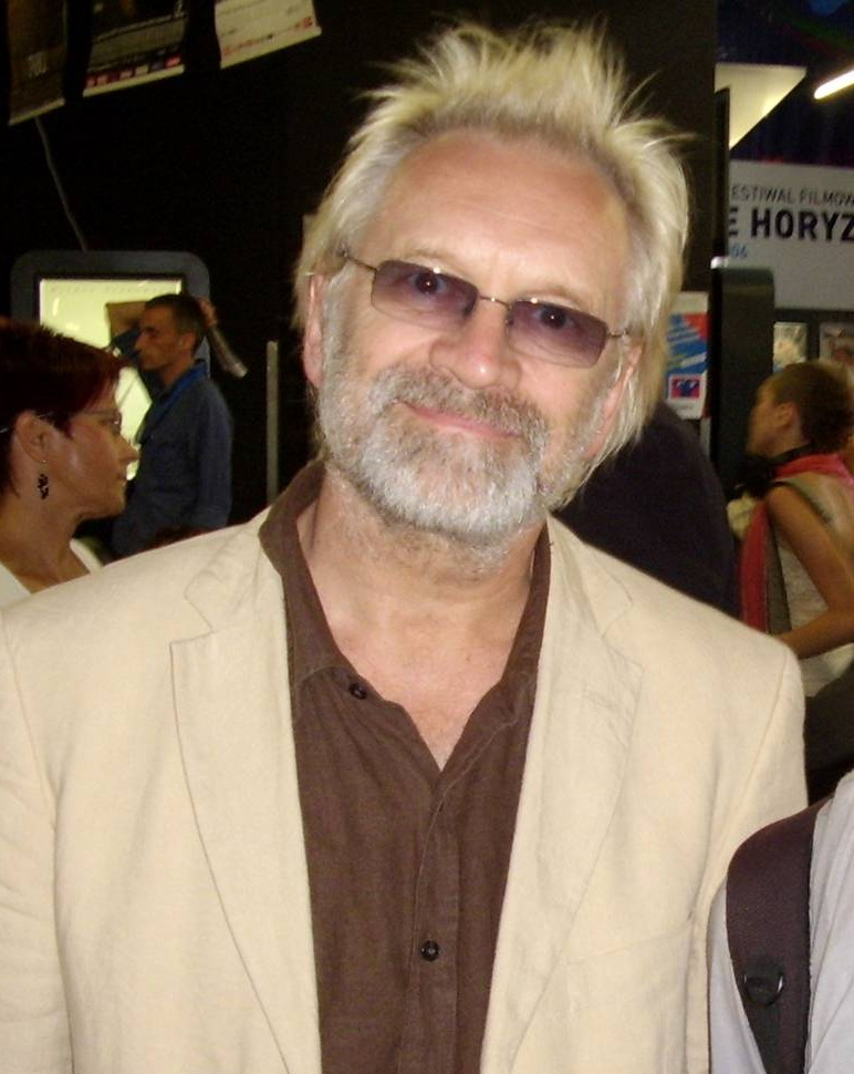 Andrzej Teodor Seweryn (ur. 25 kwietnia 1946 w Heilbronn, Niemcy) - polski aktor teatralny i filmowy, reżyser.